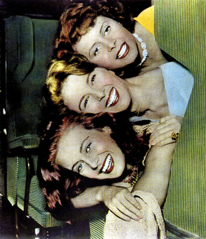 foto di scena fil Ragazze da marito